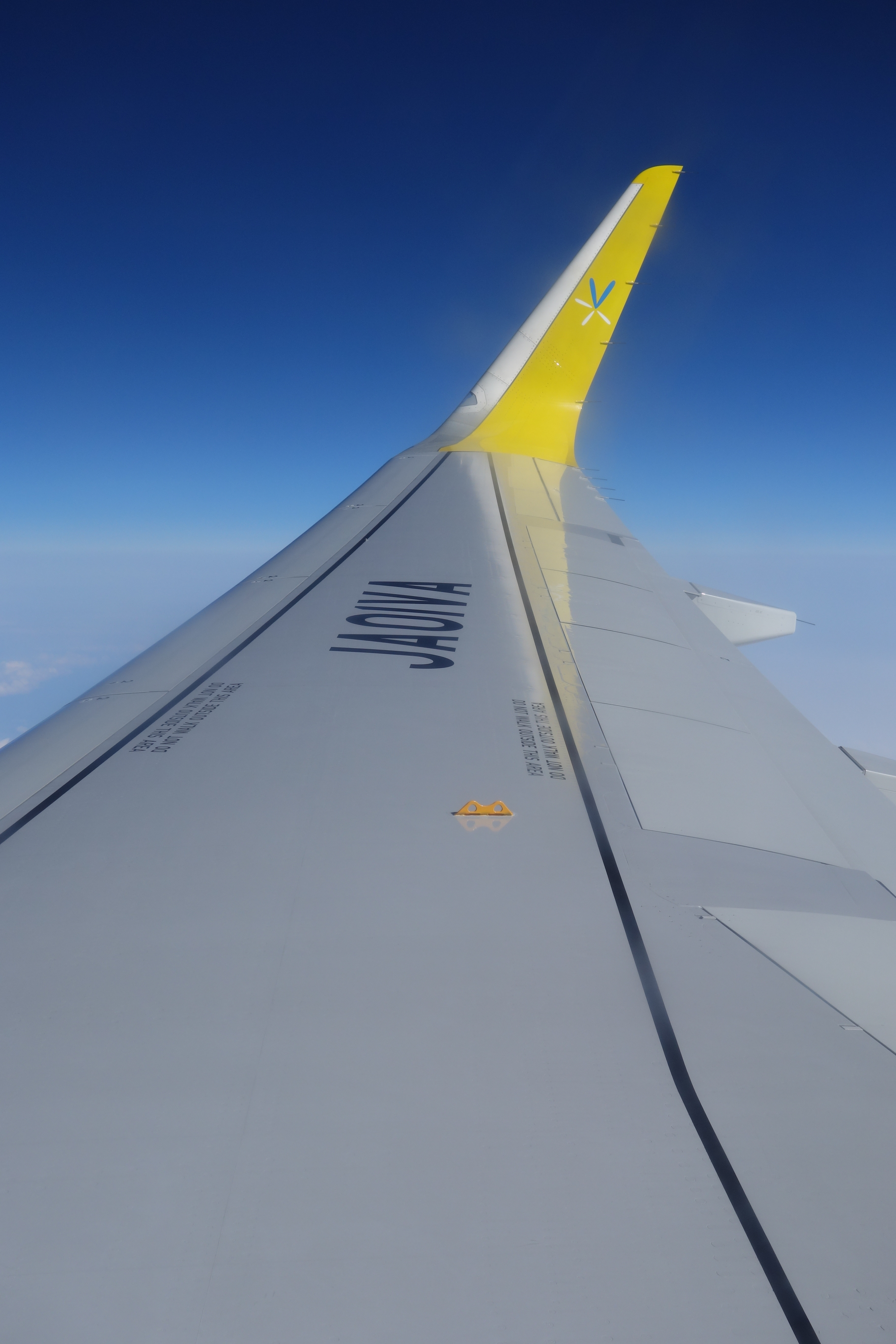 機内から見たシャークレット（バニラエア、JA01VA）